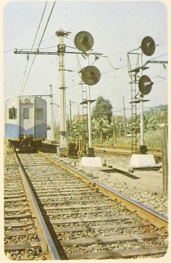 Trem da Série 200 da Estrada de Ferro Central do Brasil circulando no Ramal Santa Cruz, que havia acabado de receber os novos semáforos do sistema de Controle de Tráfego Centralizado (CTC).